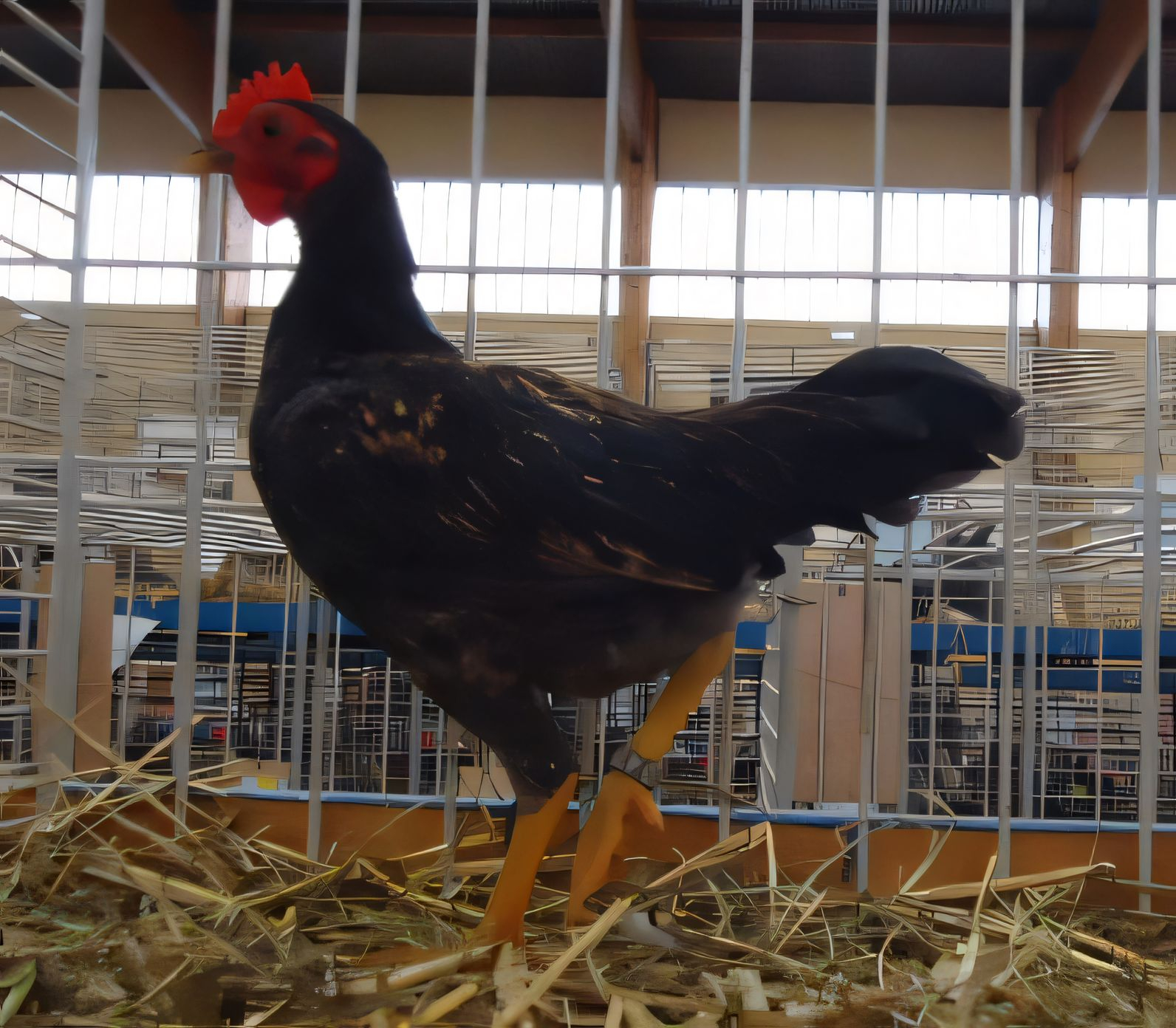 Coq de combat